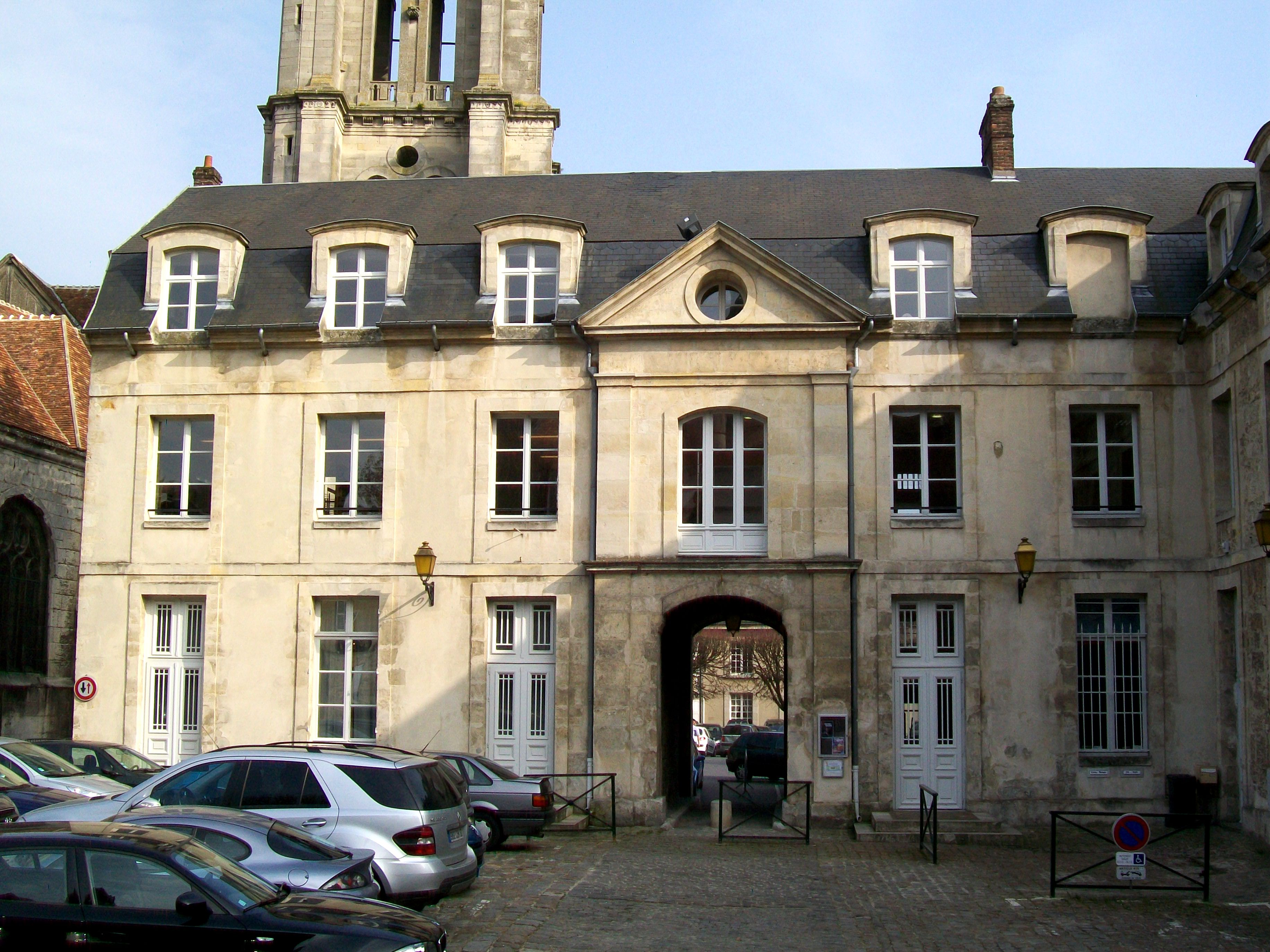 L'ancien séminaire fondé en 1664, place Saint-Pierre. L'aile méridionale, plus récent, a servi de poste pendant une bonne centaine d'années. Depuis 1976, l'ensemble accueille la bibliothèque.